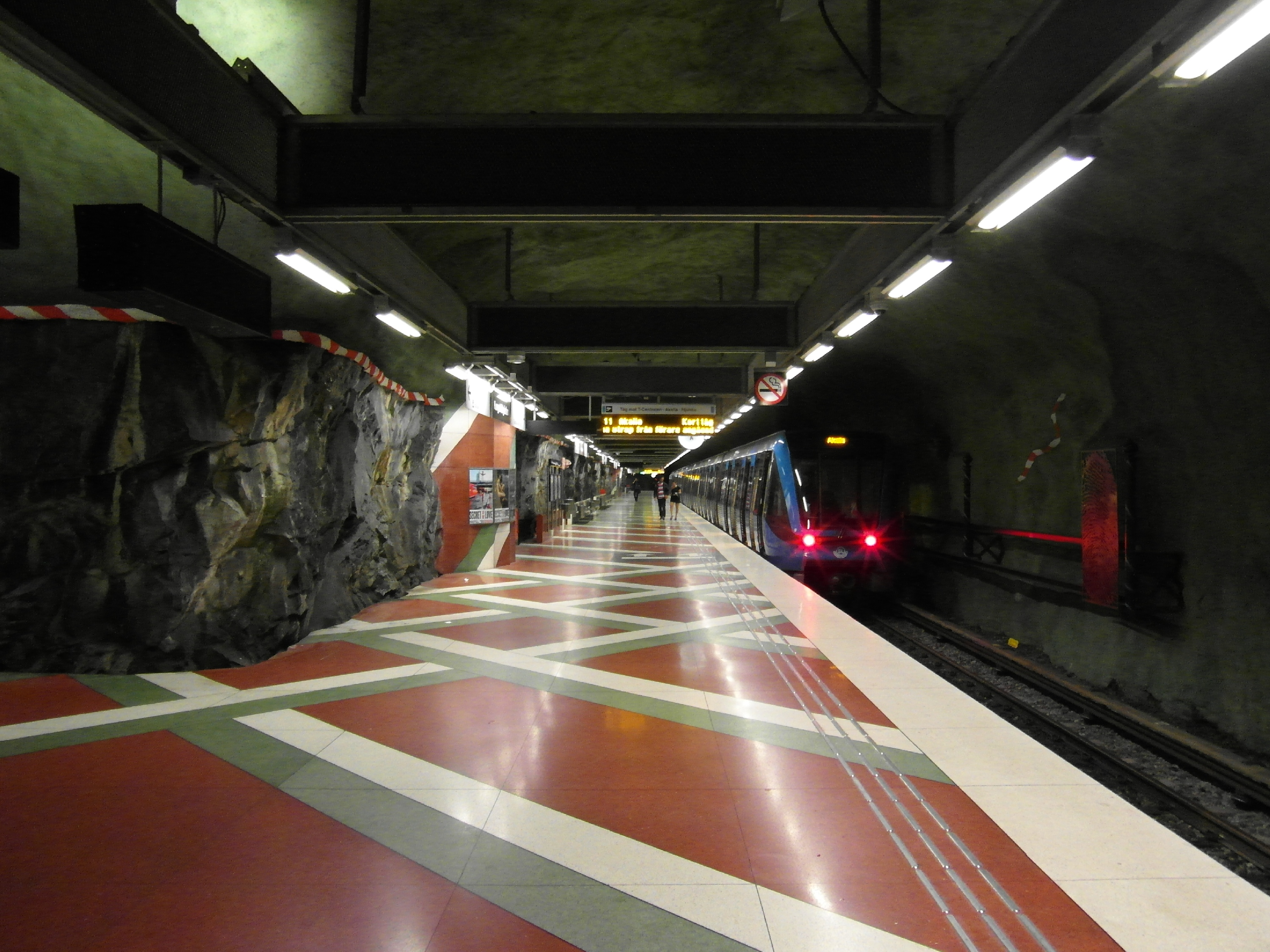 Blå linjen - T10 - T11